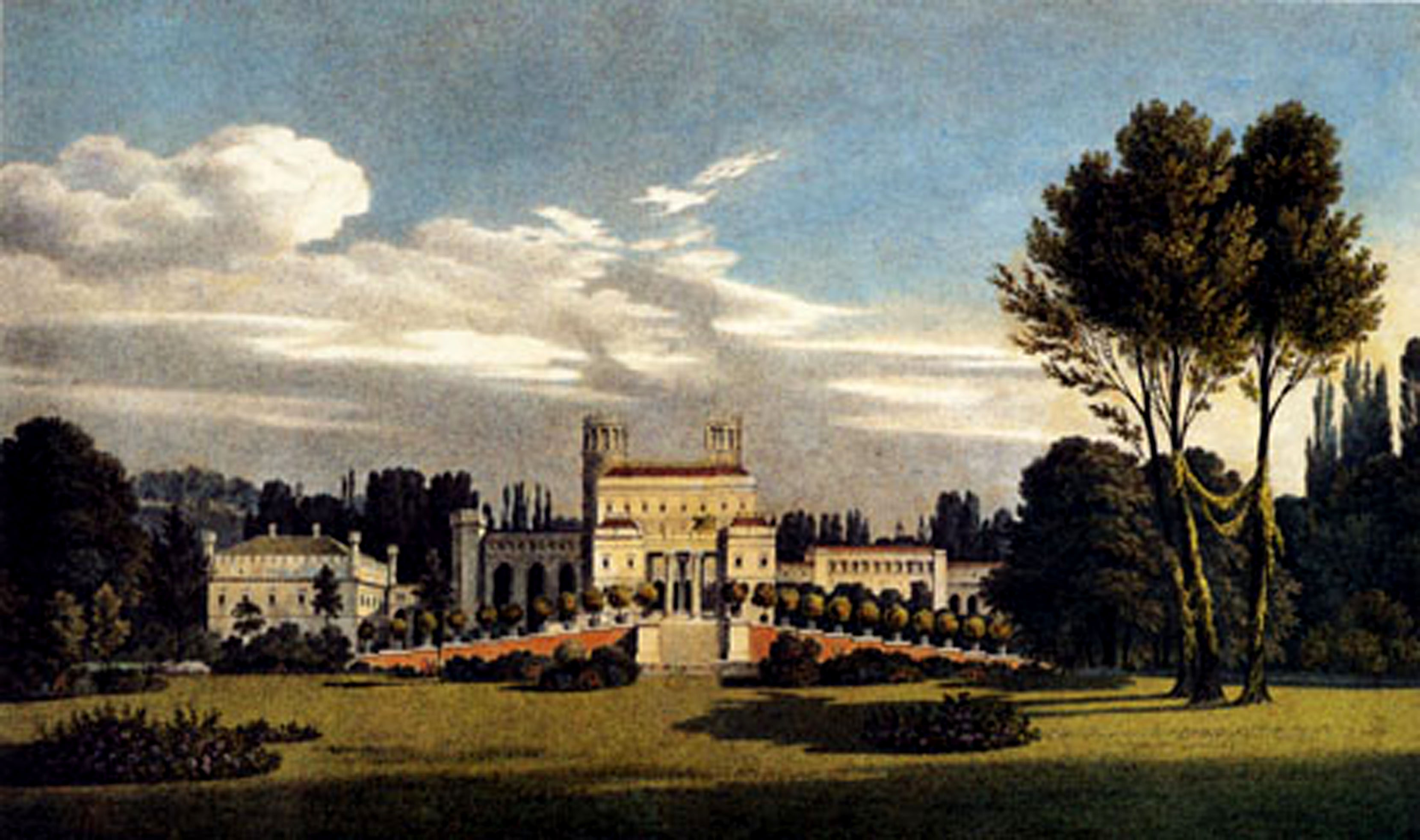 Ansicht des fürstlichen Schlosses Muskau nach Schinkels Umbauentwurf